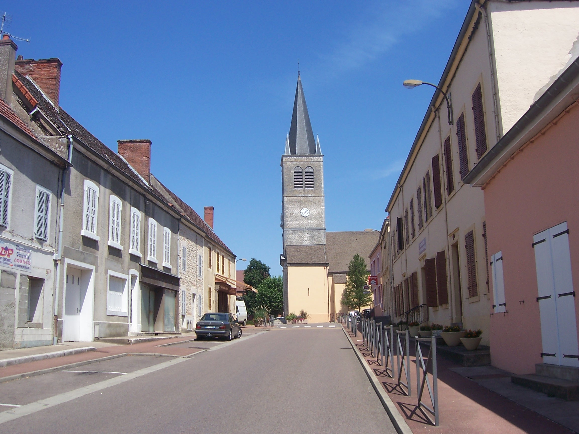 Eglise de Saint-Martin-en-Bresse